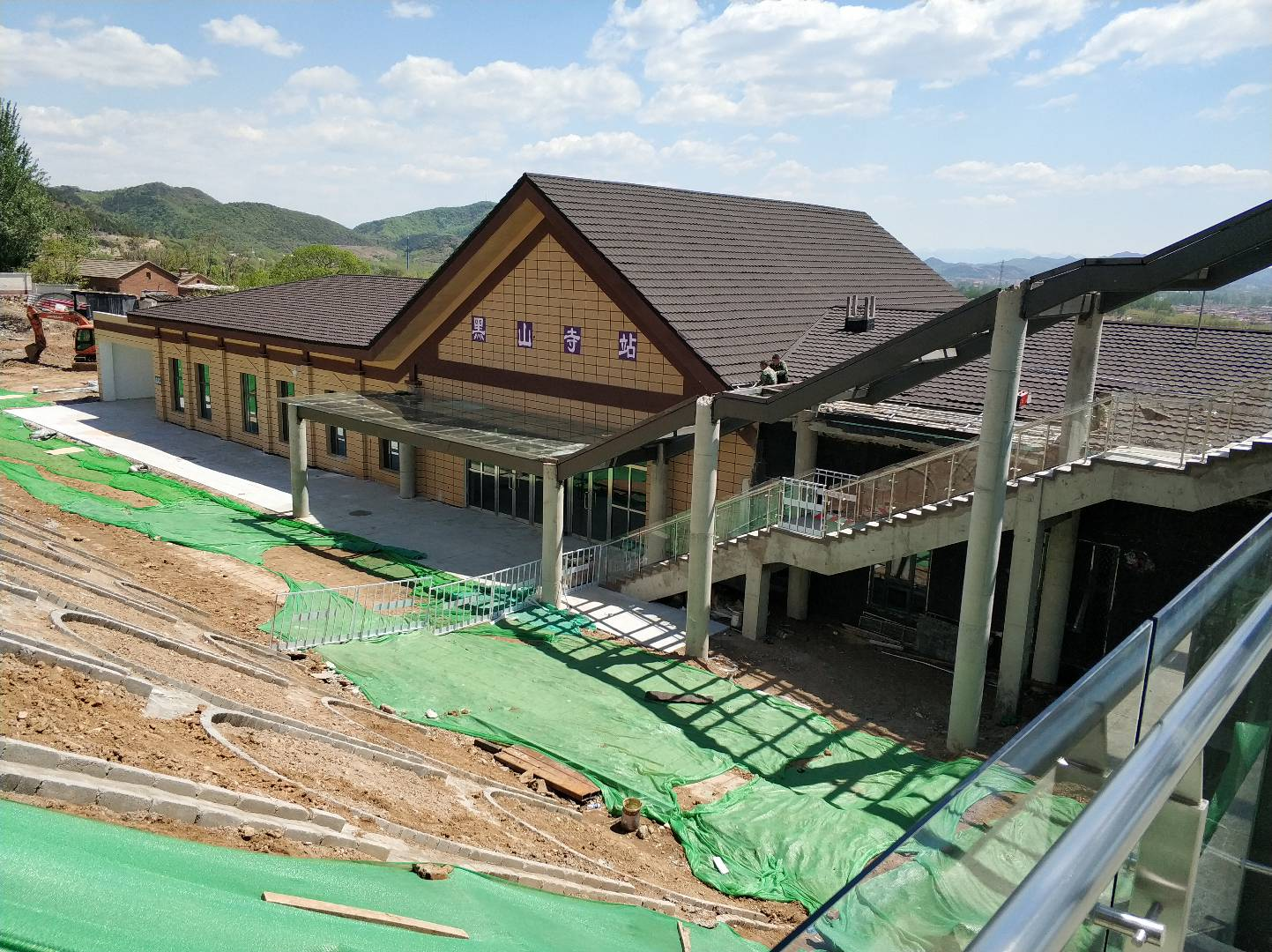 中文（中国大陆）: 黑山寺站客运开通首日